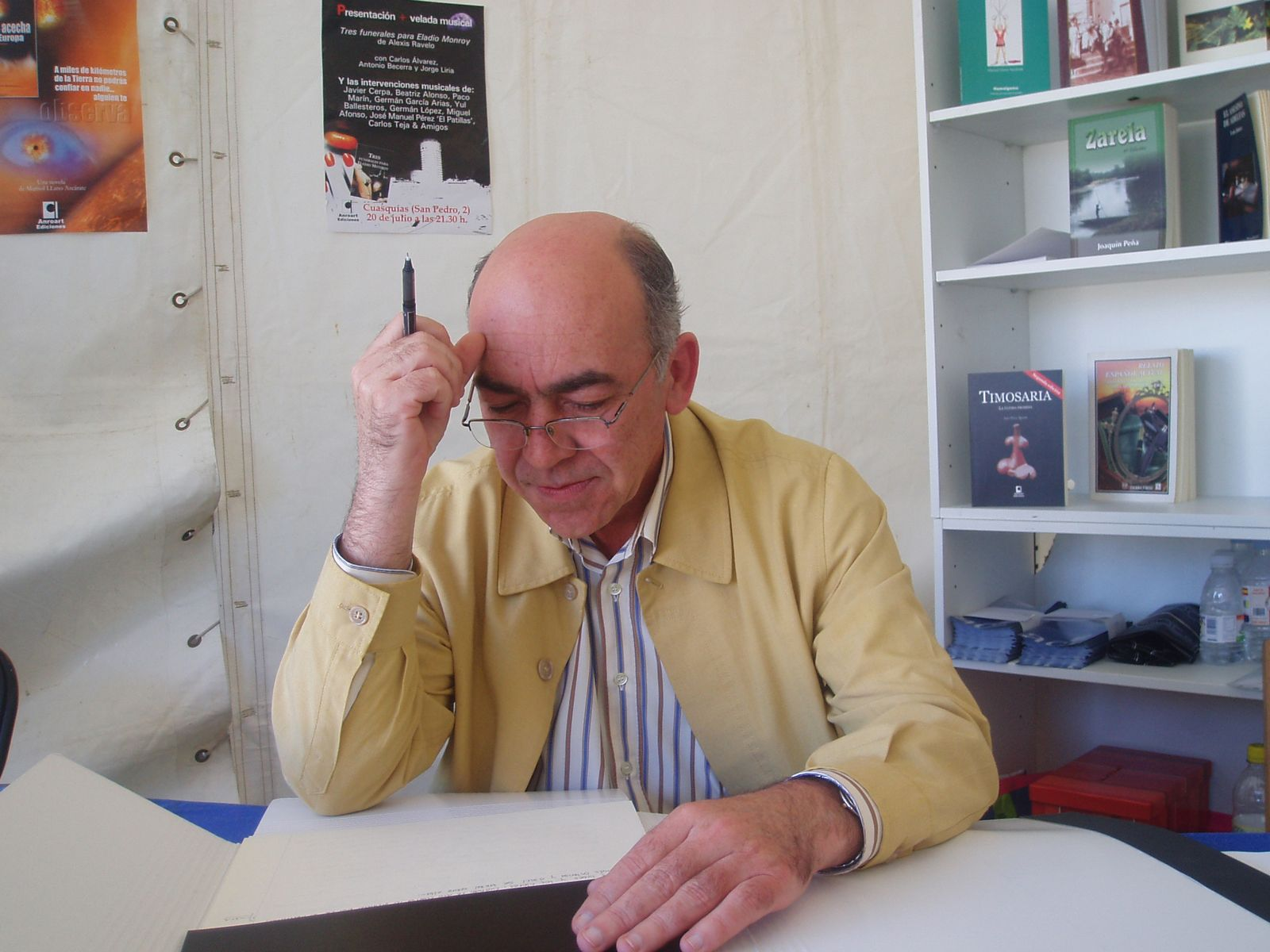 Antolín Dávila, durante la celebración de La Feria del libro de 2007